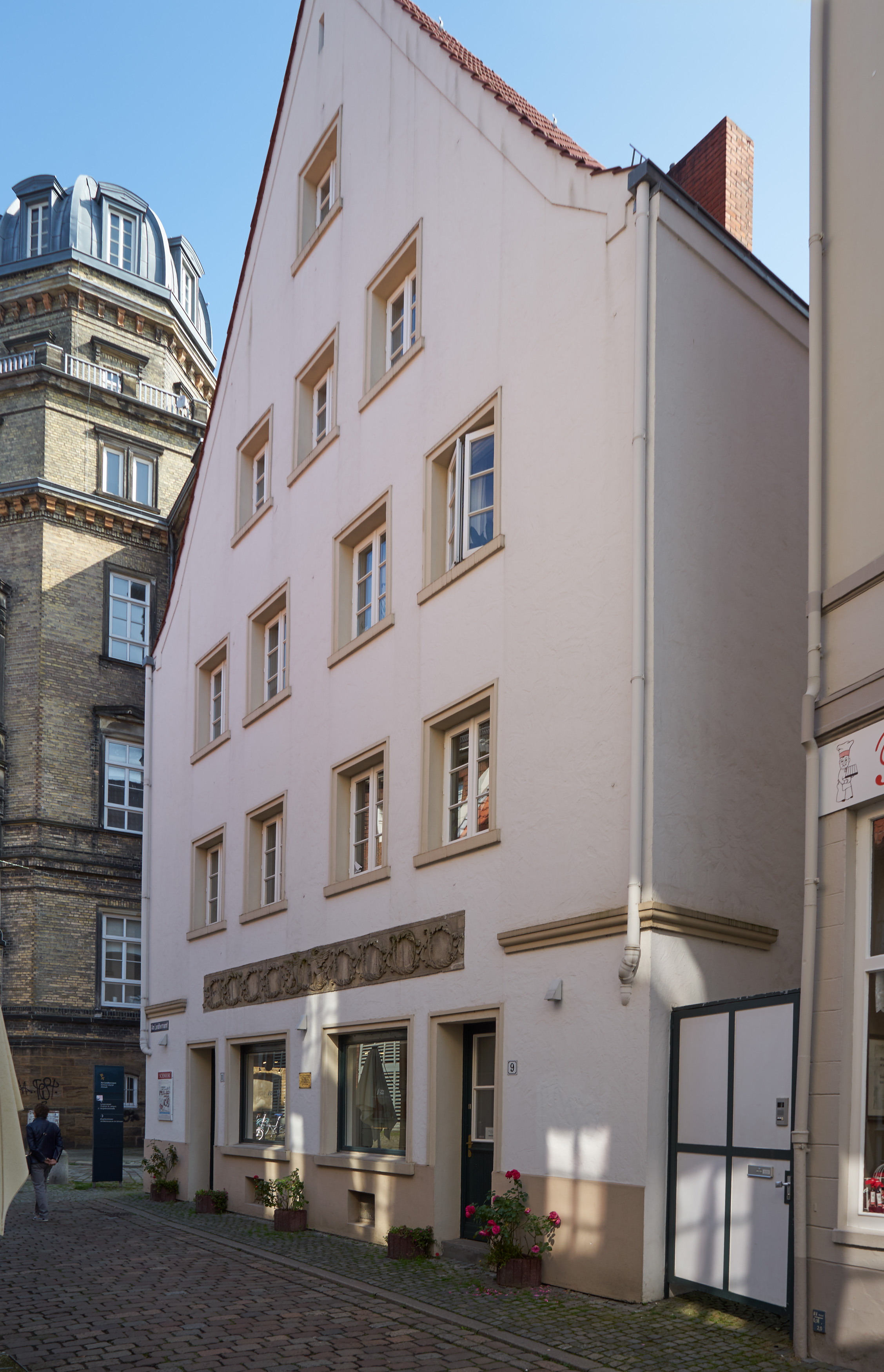 Wohnhaus in Bremen, Am Landherrnamt 9Das abgebildete Objekt ist ein geschütztes Kulturdenkmal in der Freien Hansestadt Bremen, mit der Nr. 1434 beim Landesamt für Denkmalpflege registriert.